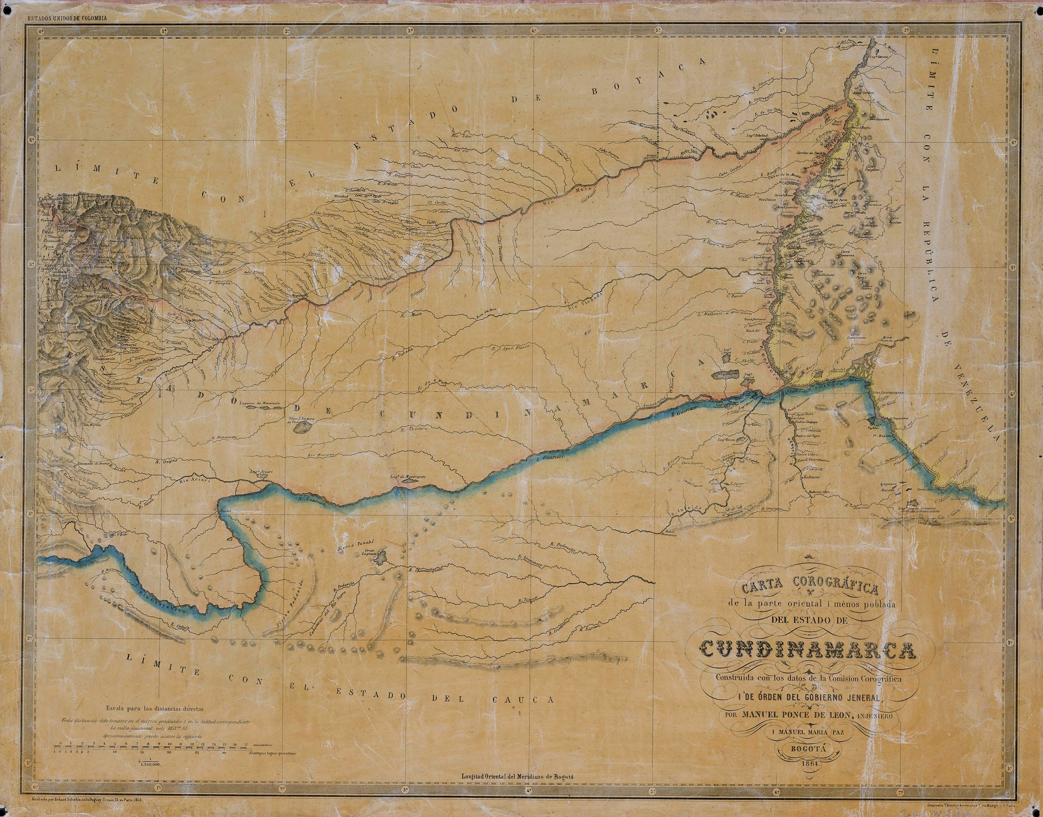 Carta Corográfica del Territorio de San Martín. Tomado del "Atlas de los Estados Unidos de Colombia, antigua Nueva Granada", 1865.